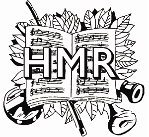 HMR Logo los